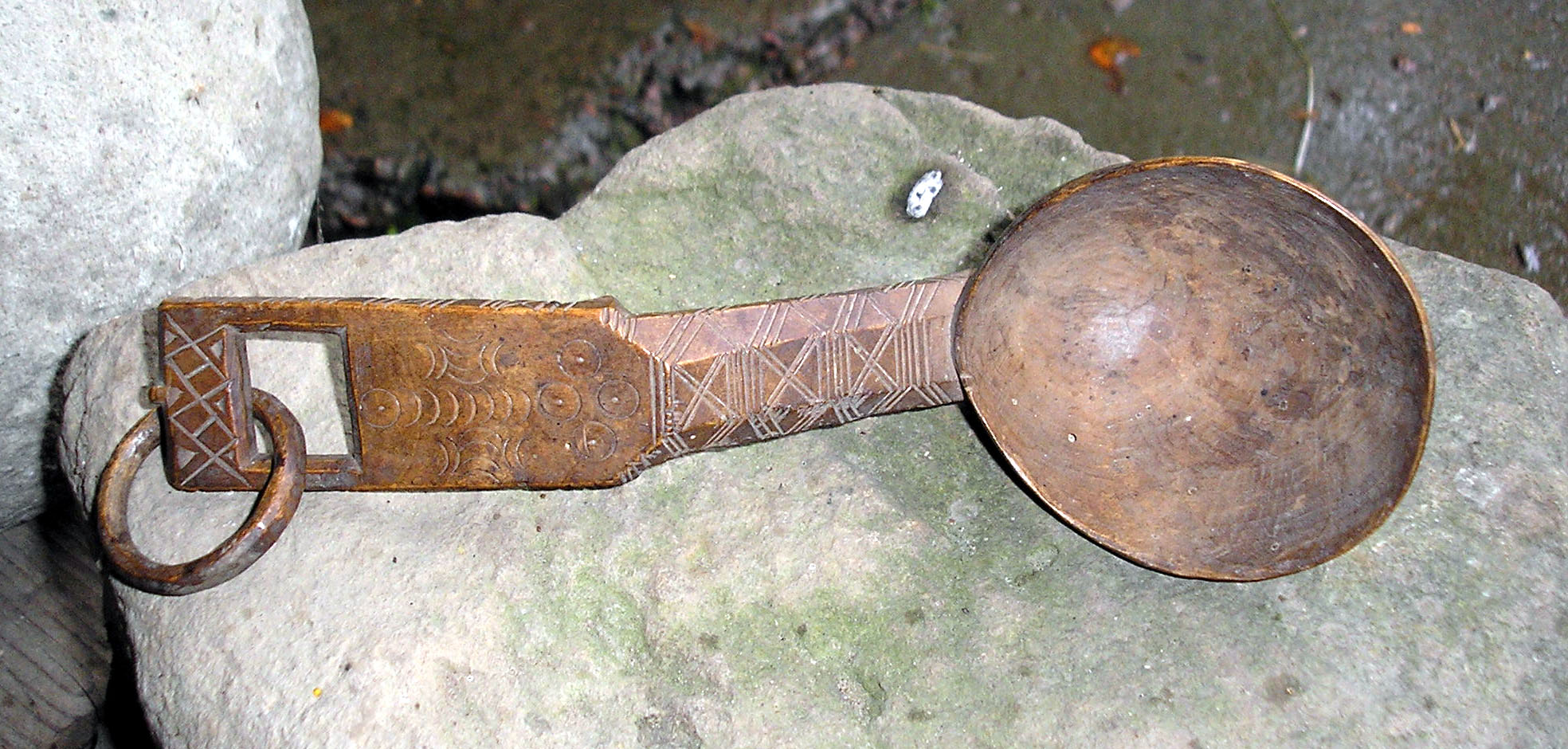 Експонат музею Довбуша у с.Космач